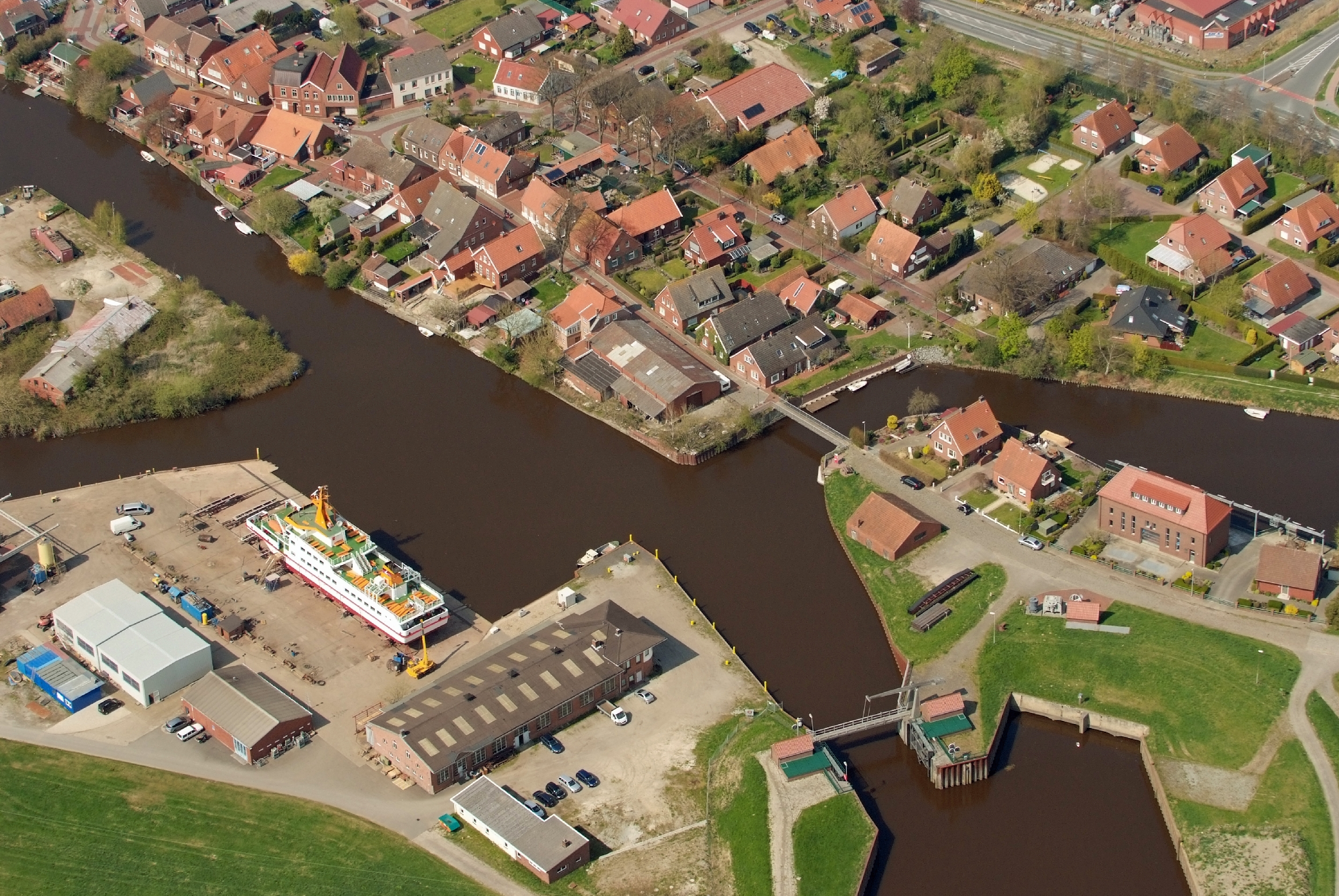 Teilansicht von Oldersum in der Gemeinde Moormerland mit der Bültjer-Werft